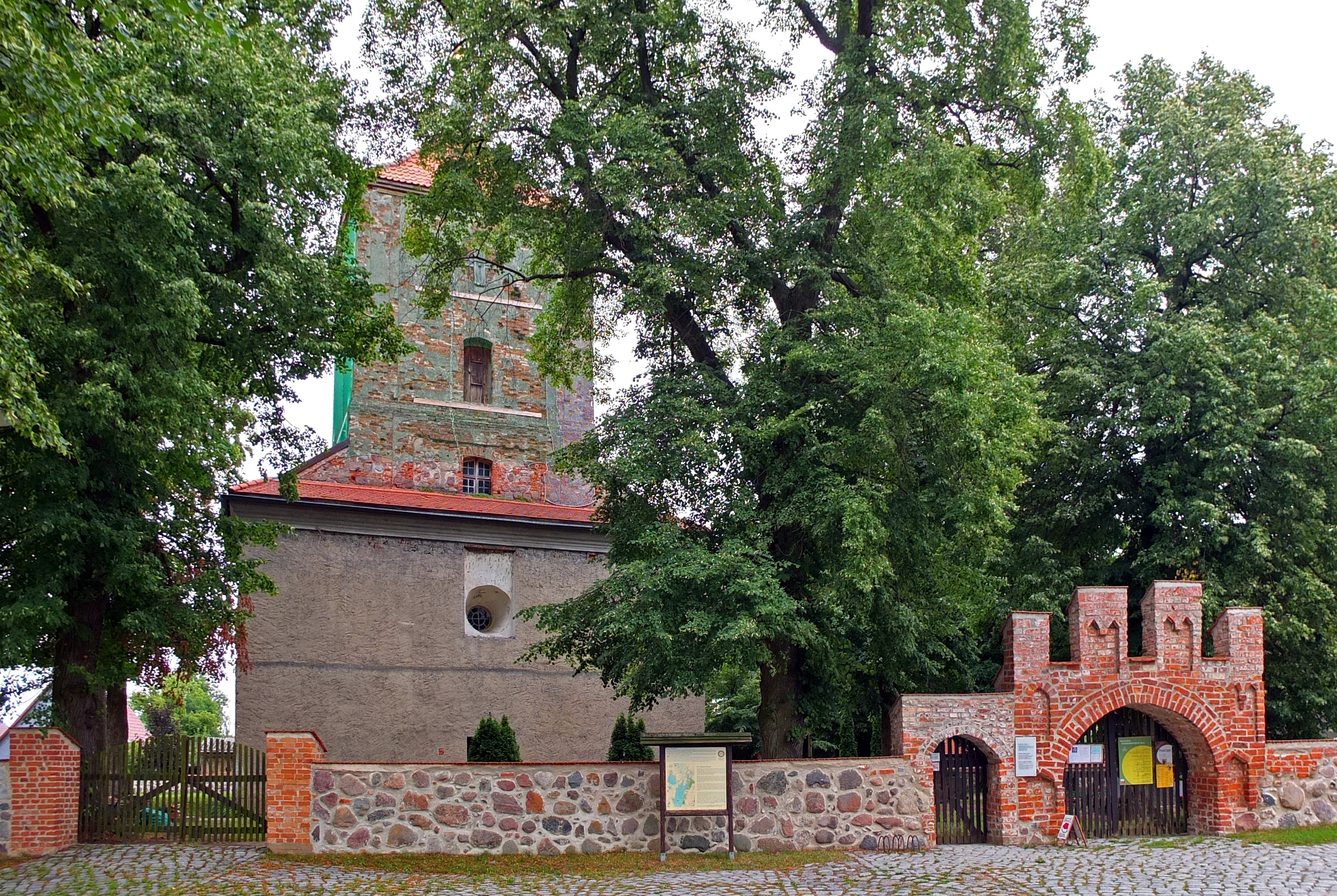 Denkmalgeschützte Kirche und Kirchhofseinfriedung in Potzlow (Gemeinde Oberuckersse, Landkreis Uckermark, Land Brandenburg, Deutschland)